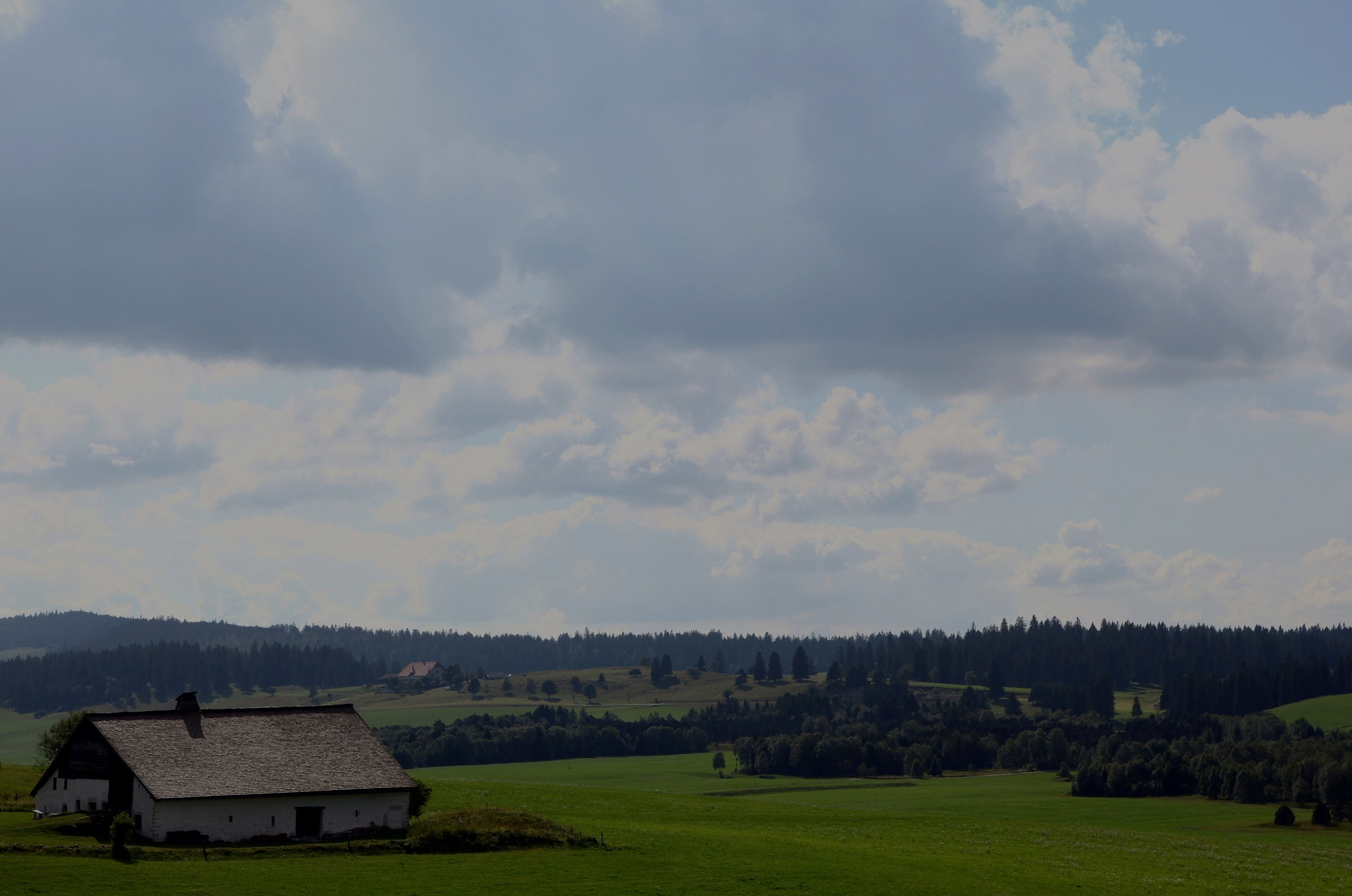 Le Grand Cachot